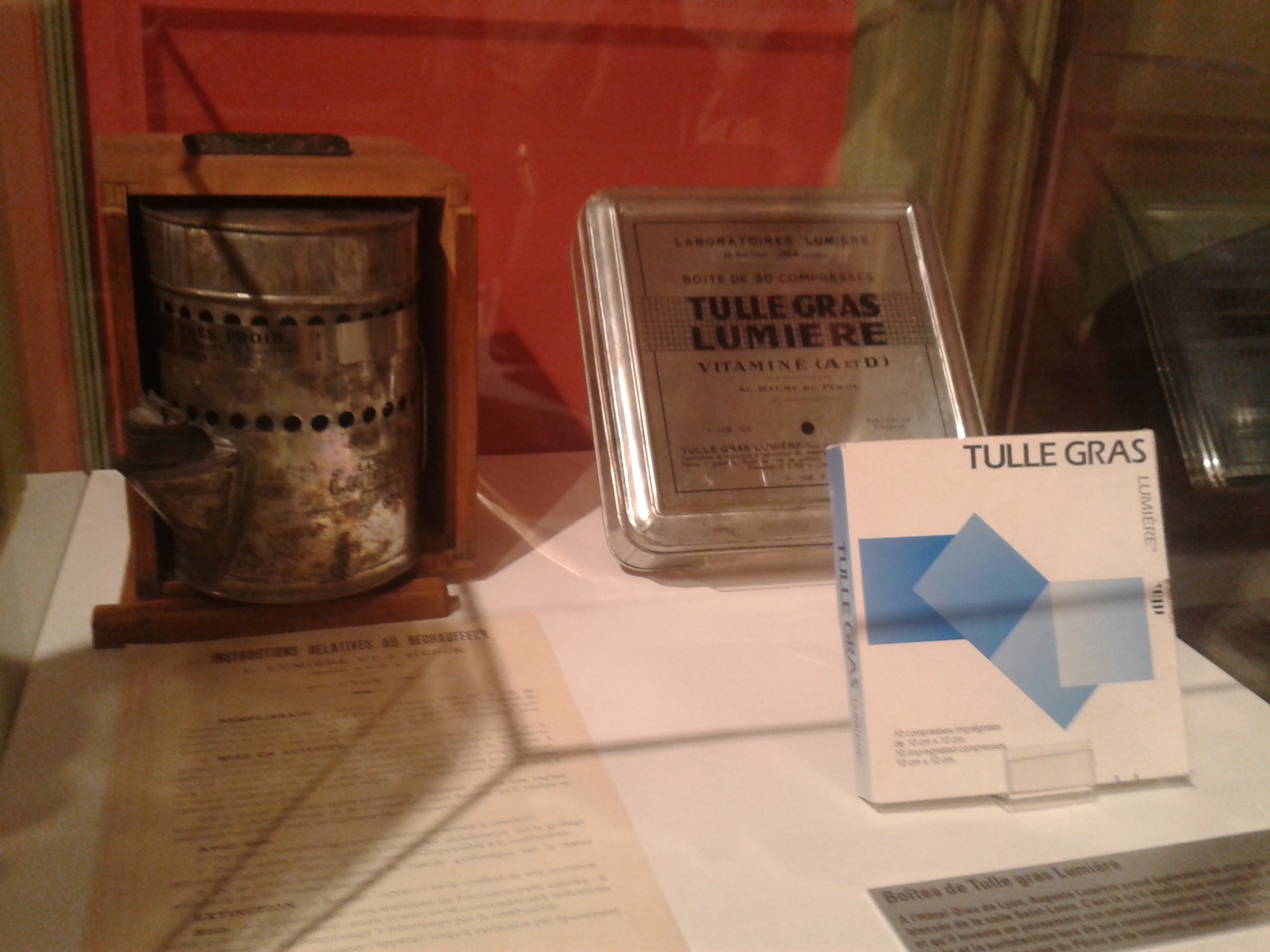 Boites de Tulle gras, pansement inventée par les frères lumières, exposées à l'Institut Lumière de Lyon